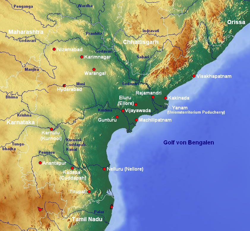 Topographische Karte des indischen Bundesstaats Andhra Pradesh mit Städten und Flüssen